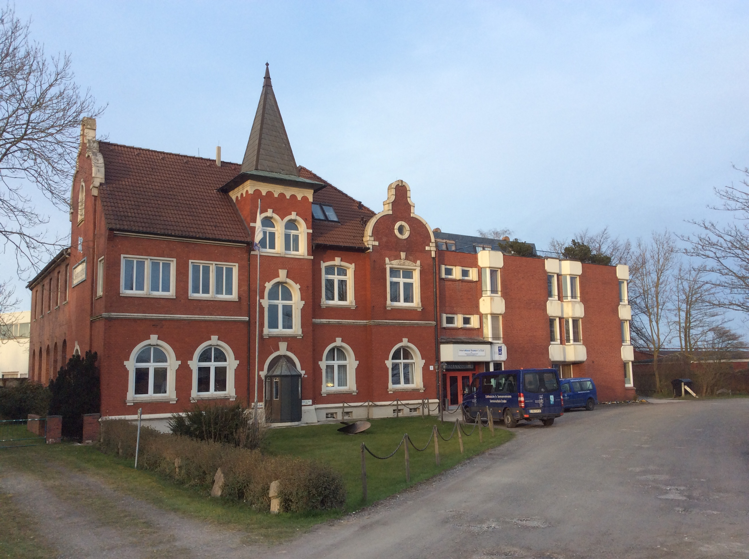 Gebäude der Ostfriesischen Evangelischen Seemannsmission am Außenhafen in Emden.